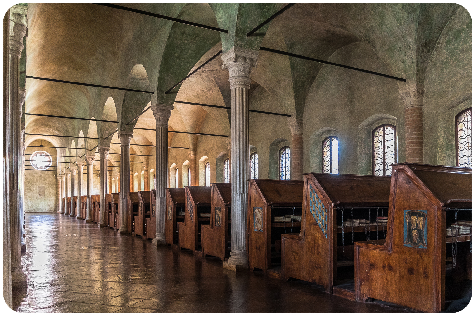 Biblioteca Malatestiana This is a photo of a monument which is part of cultural heritage of Italy.